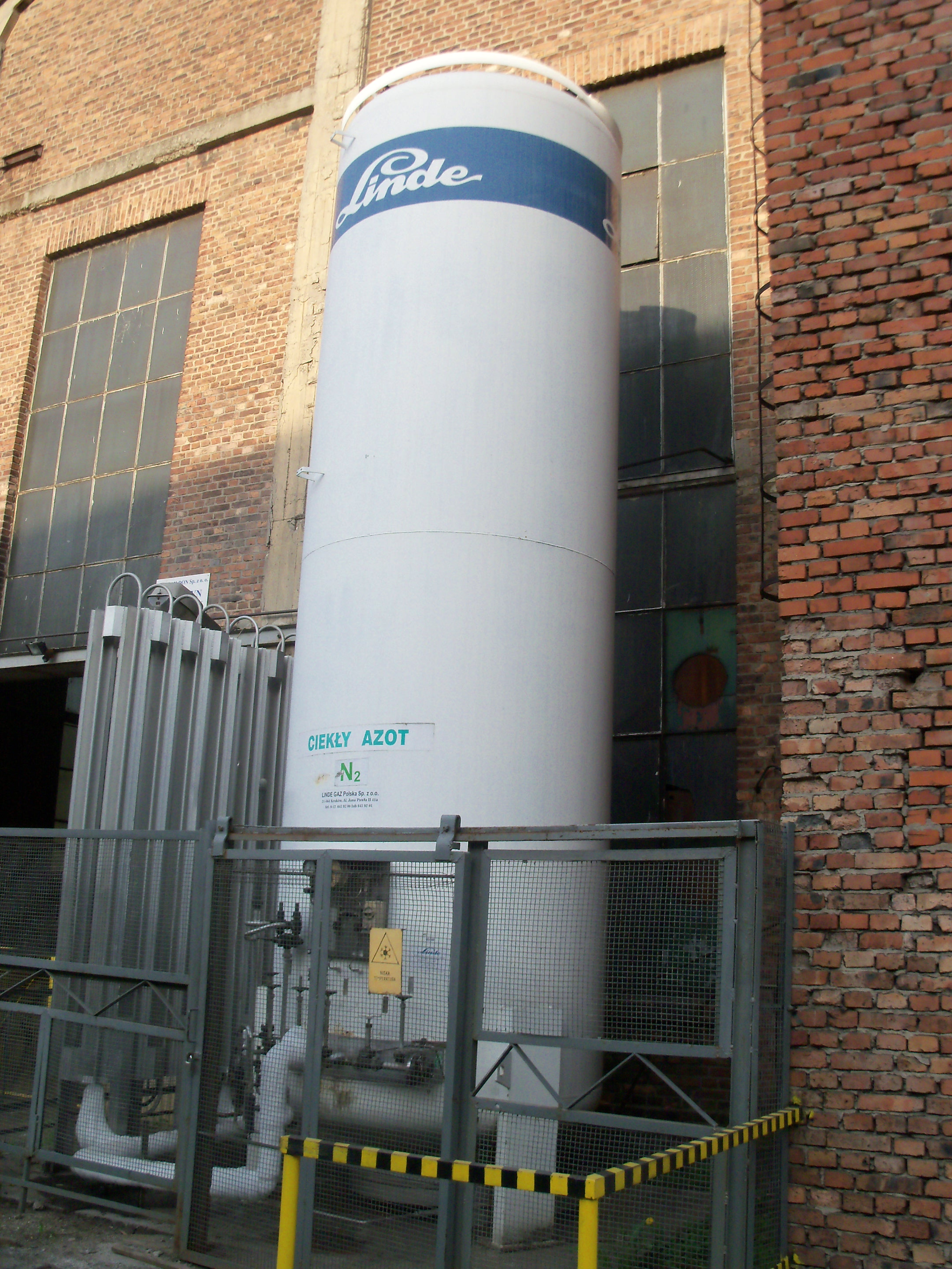 Huta Baildon w Katowicach - Ciekły Azot